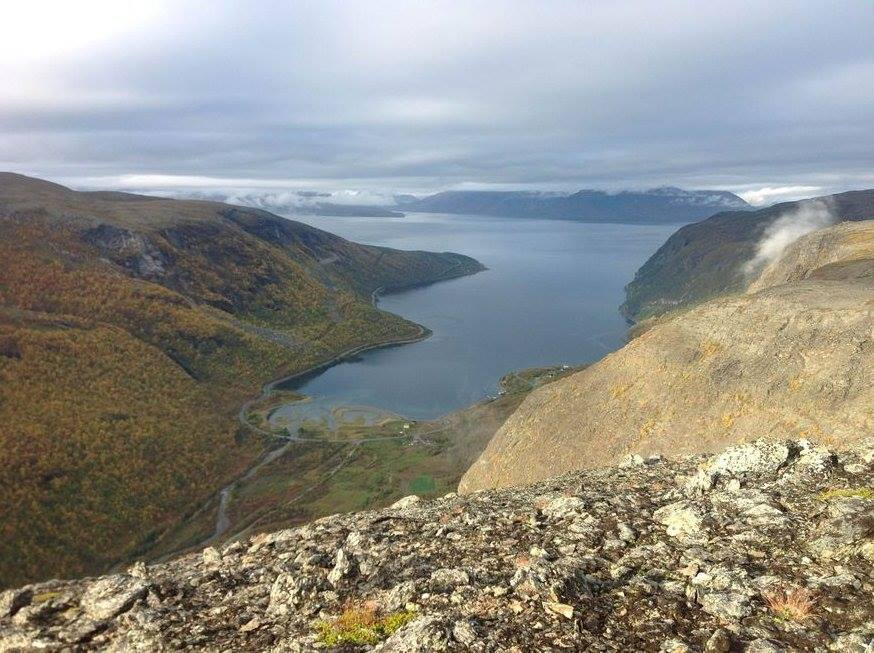 Skillefjorden sett fra høyden